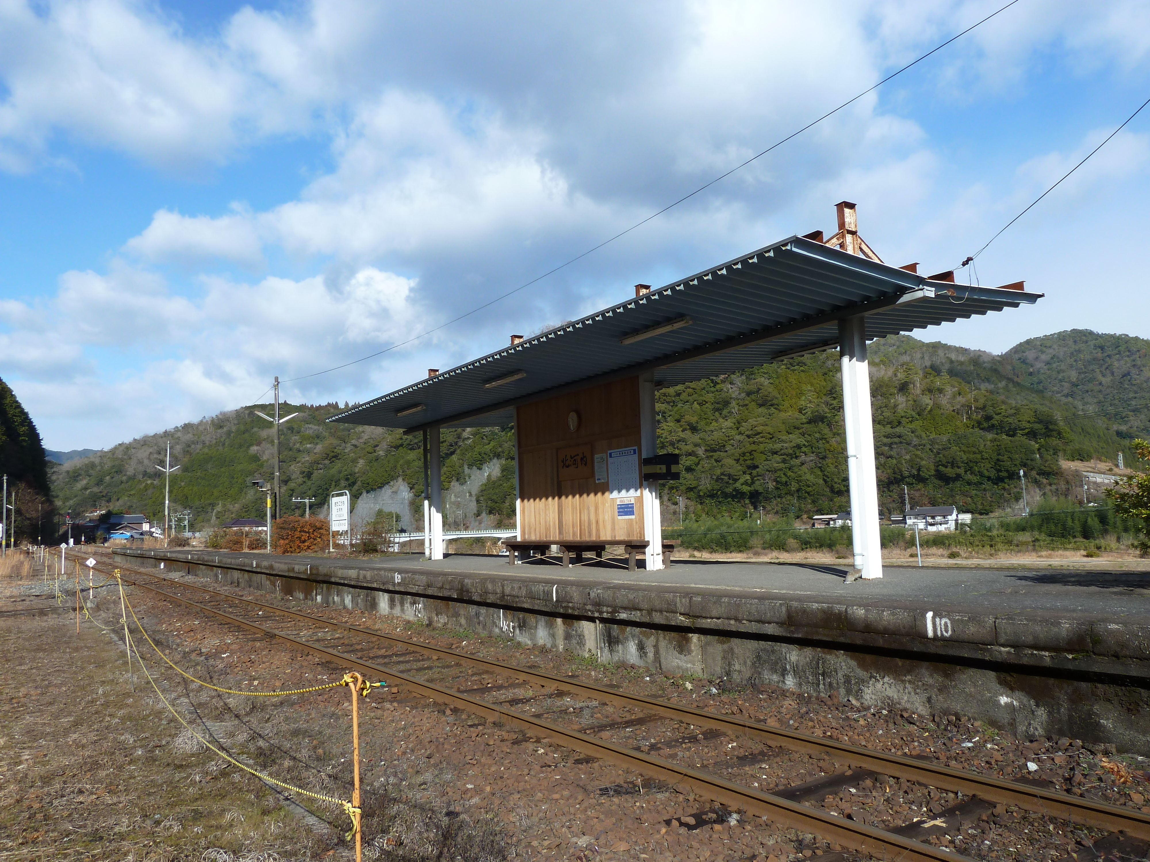 錦川鉄道 北河内駅の構内